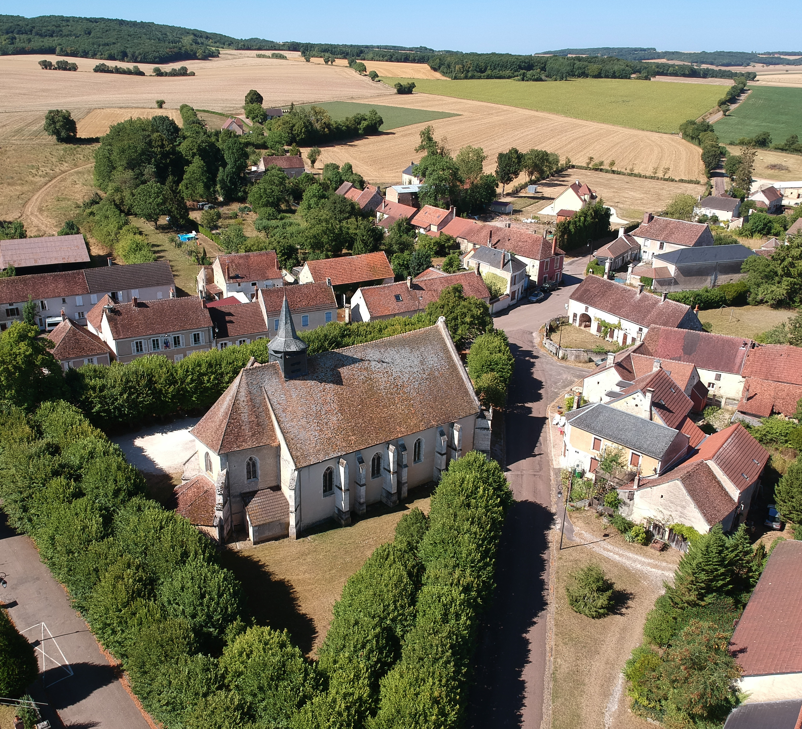 Image aérienne de Sougères-en-Puisaye en juillet 2018.